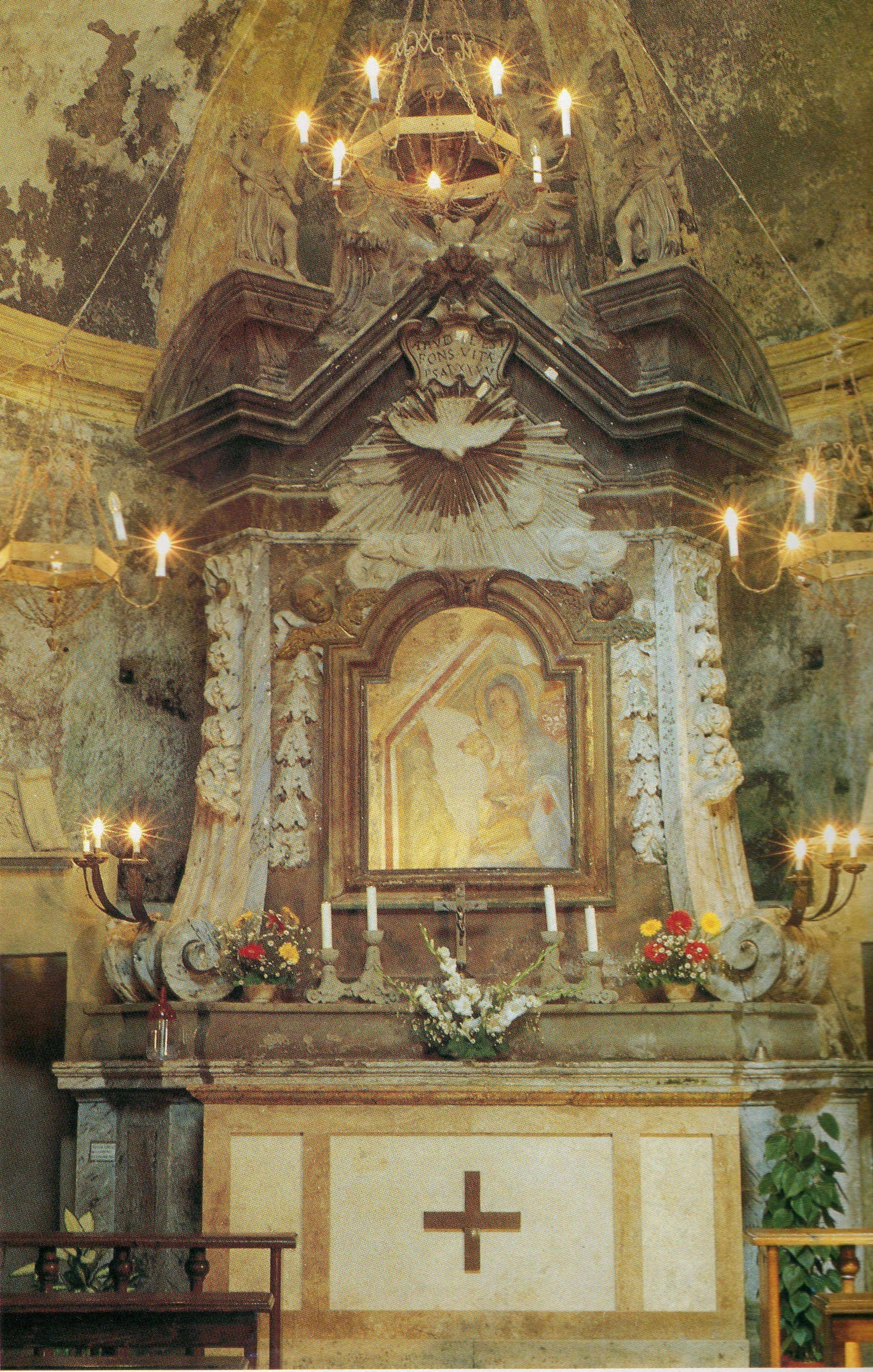 La Madonna dell'Acquasanta a Marino (RM)